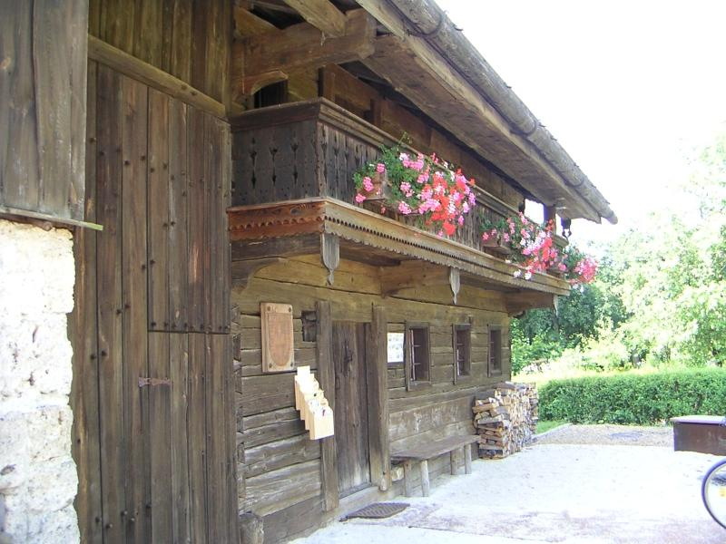 F.X.Gruber Gedächtnishaus Hochburg, es ist nicht das Geburtshaus!